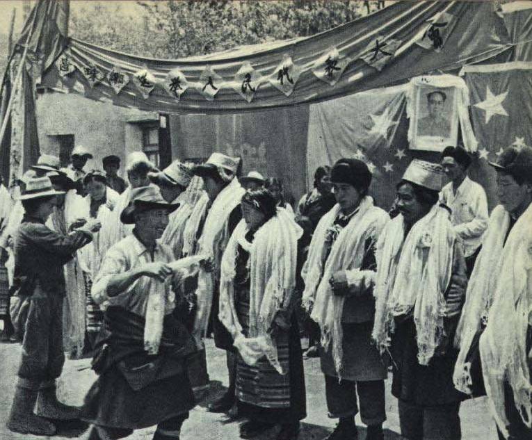 1963-02 1963年 西藏普选